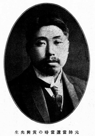 黃興 肖像